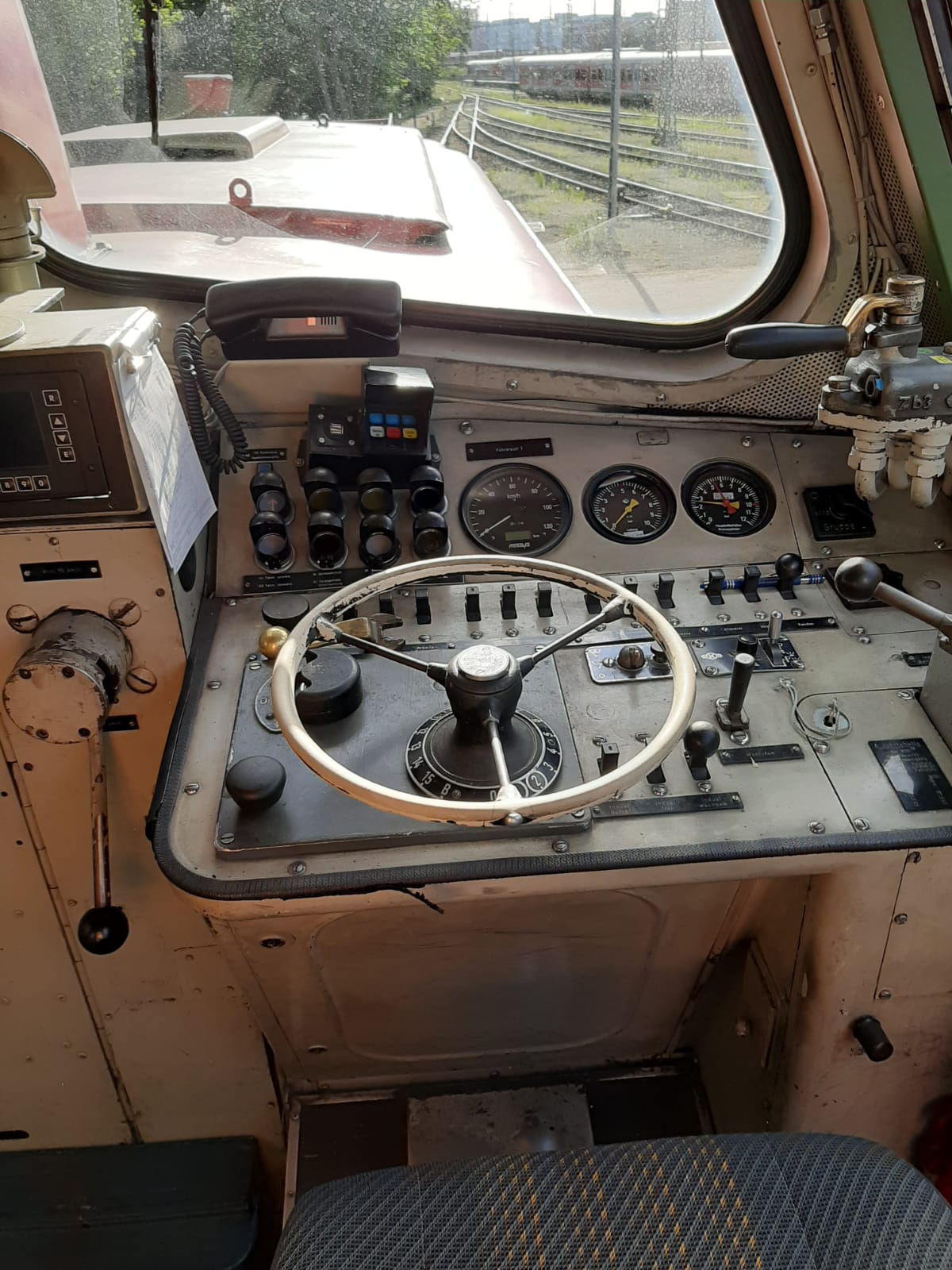 Führerstand der V 100 (212 265-3)